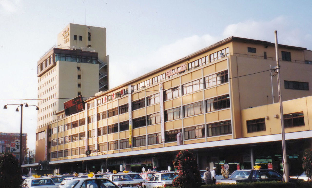 JR九州小倉駅（改築前）